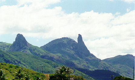 Pedra do Frade, Itapajé - CE - Brasil, Ícone que deu nome a cidade de Itapajé, por Ribamar Ramos